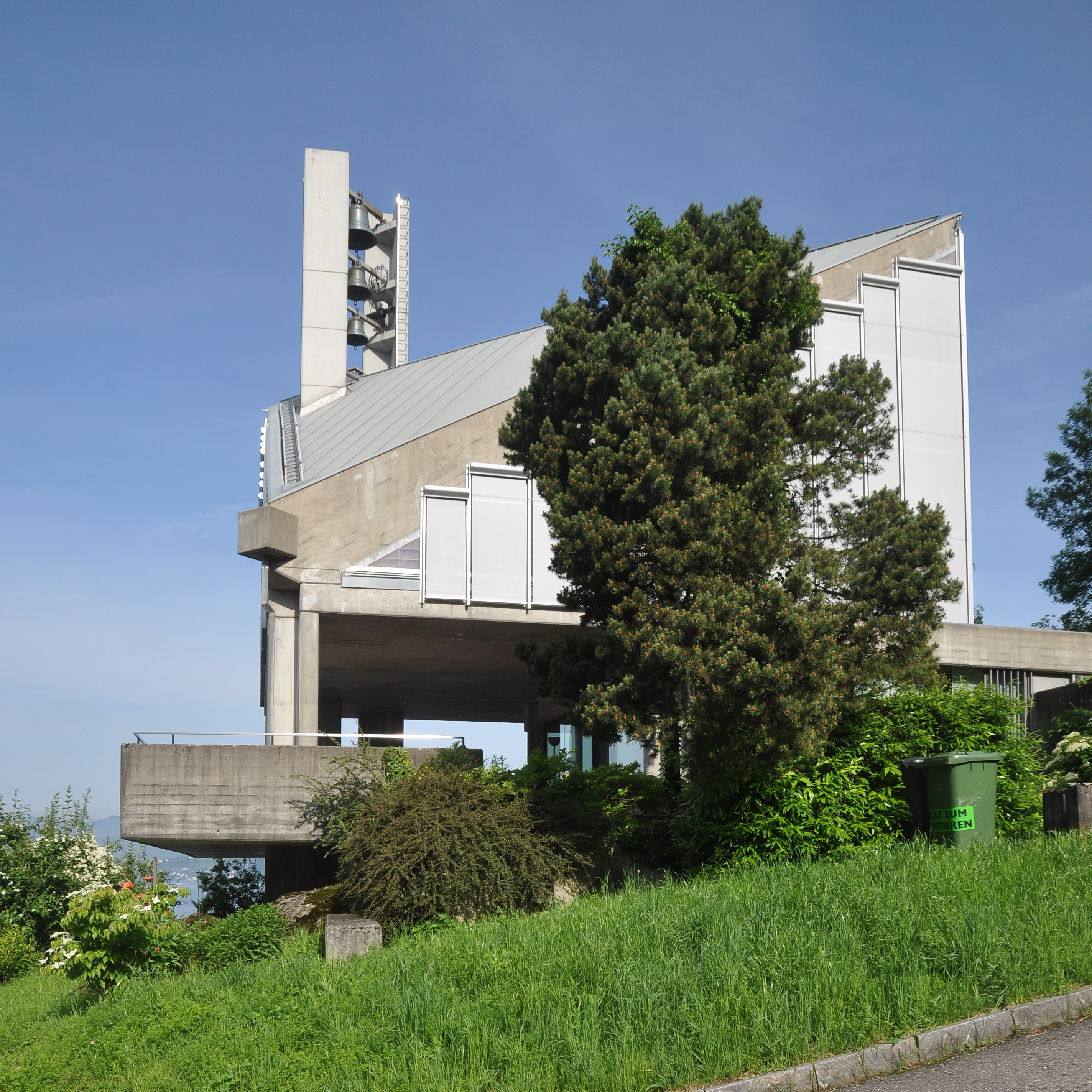 Reformierte Kirche Walchwil, Architekten: Hans-Peter Ammann, 1960—64